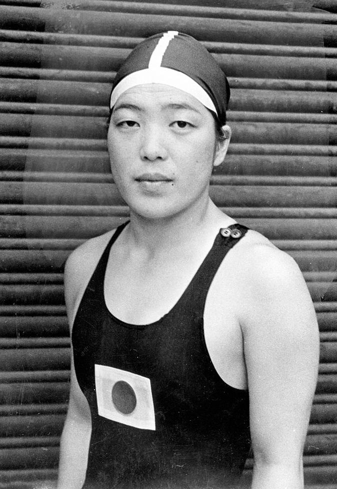 Kazue Kojima